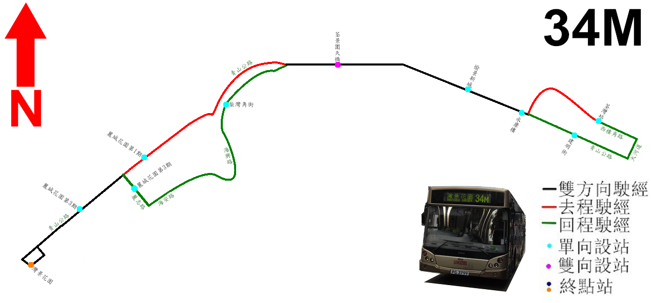 中文（香港）: 九巴34M線的走線圖